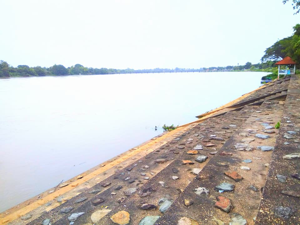 แม่น้ำมูล ณ ท่าน้ำวัดโพธิ์ตาก